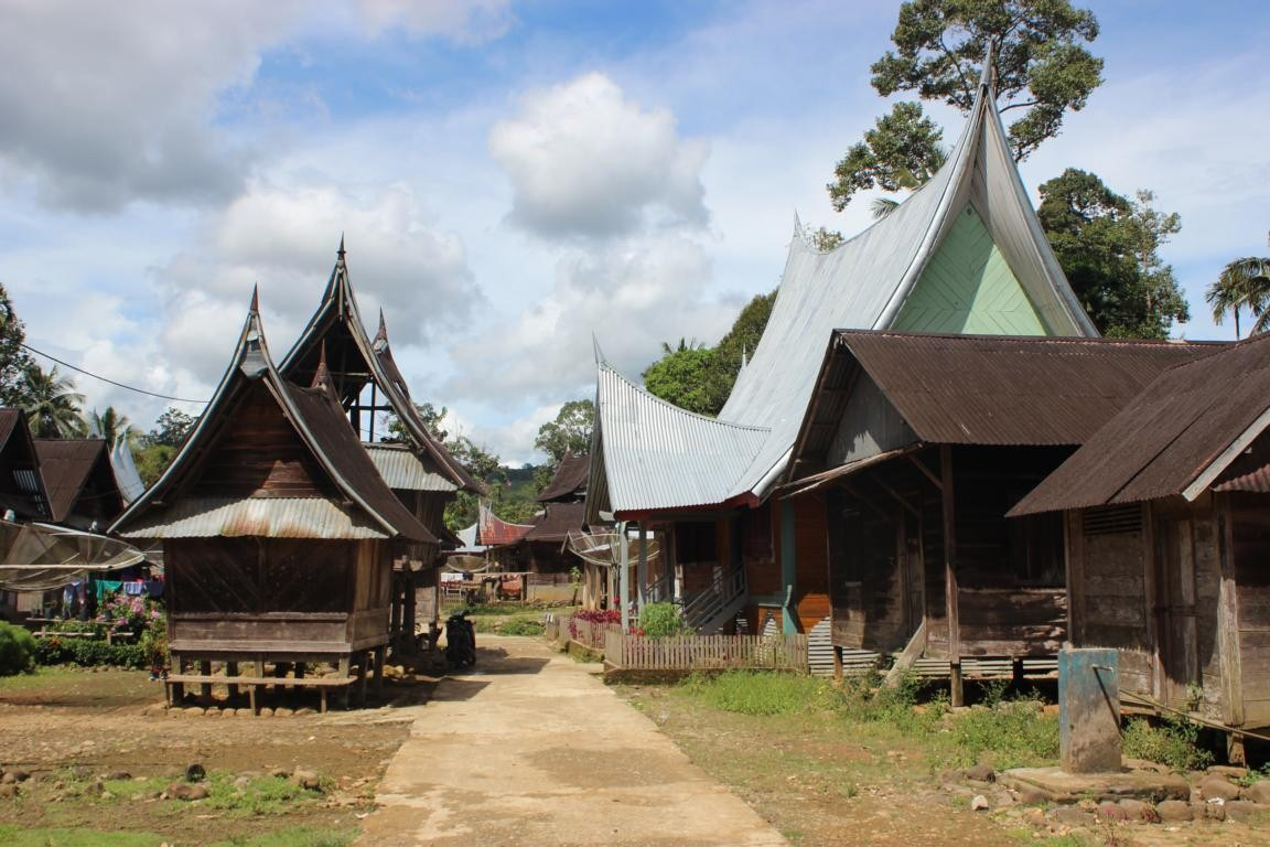 Perkampungan Tradisonal Tinggam Kajai